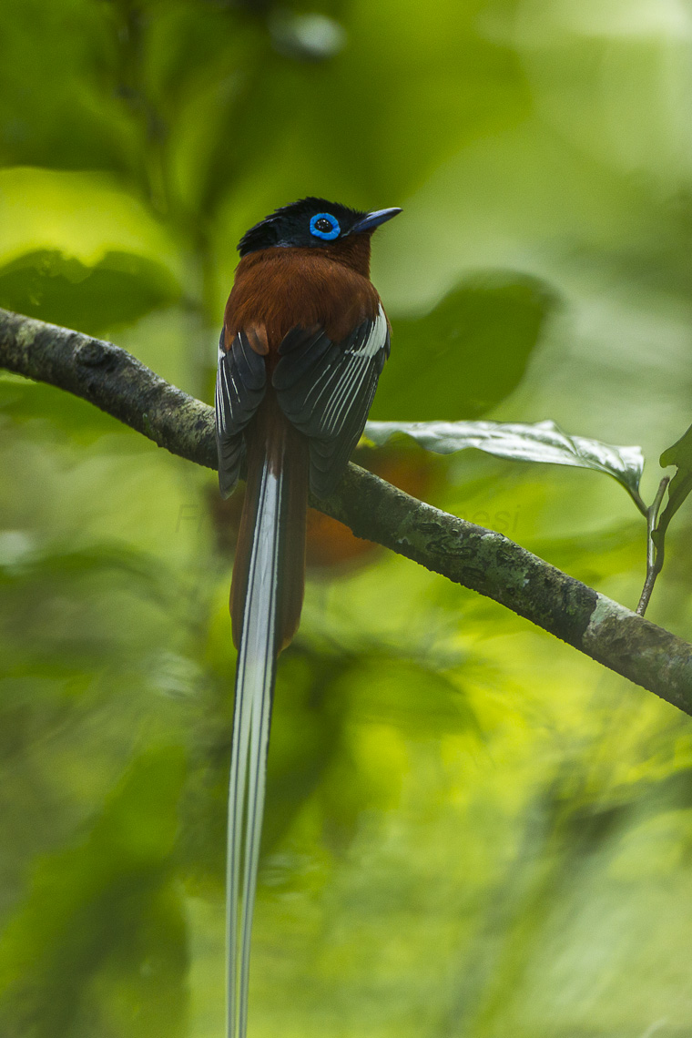 Madagascar Paradise-Flycatcher - Masoala - Madagascar_S4E7425